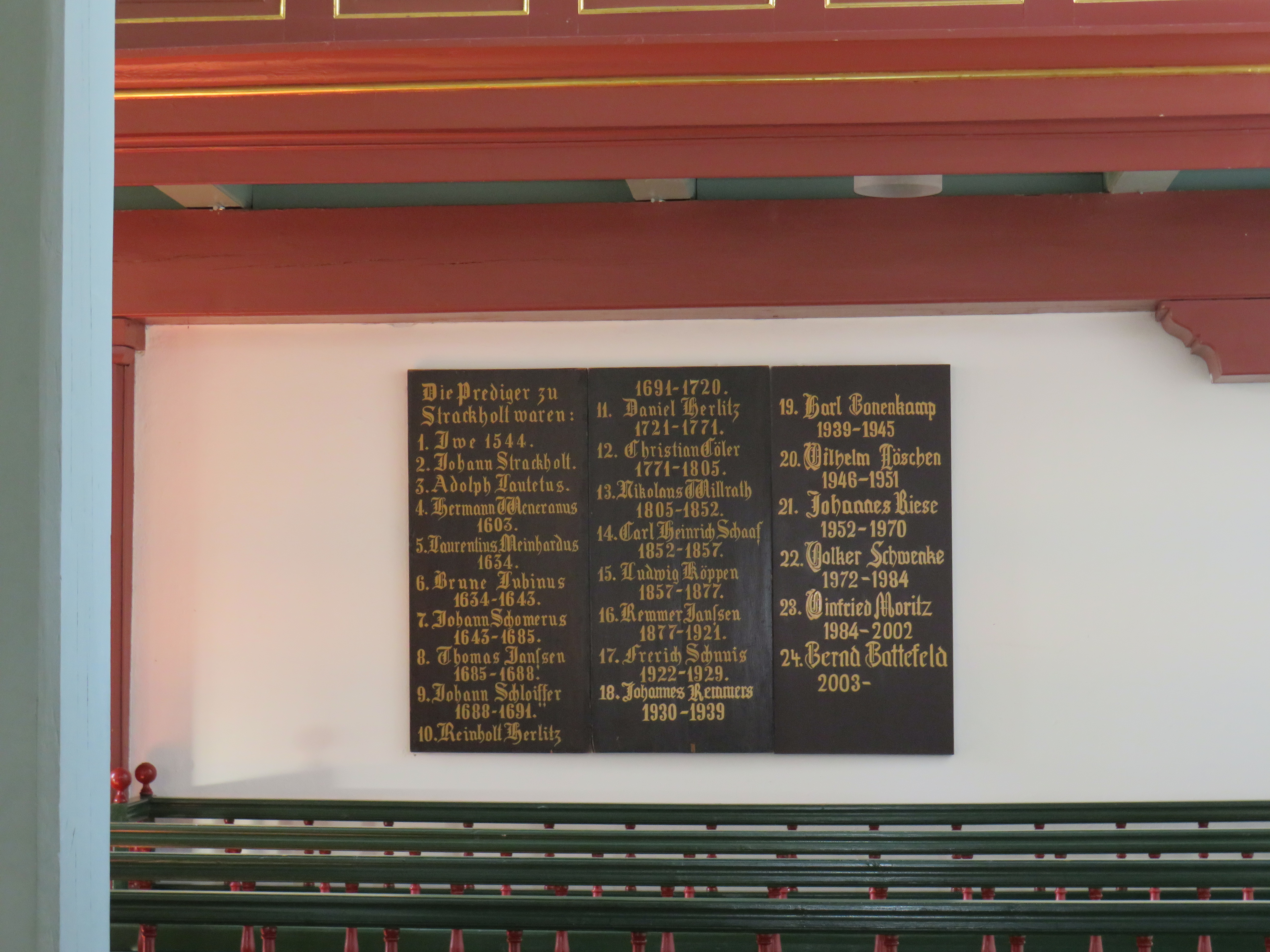 Barbara-Kirche (Strackholt) innen 3